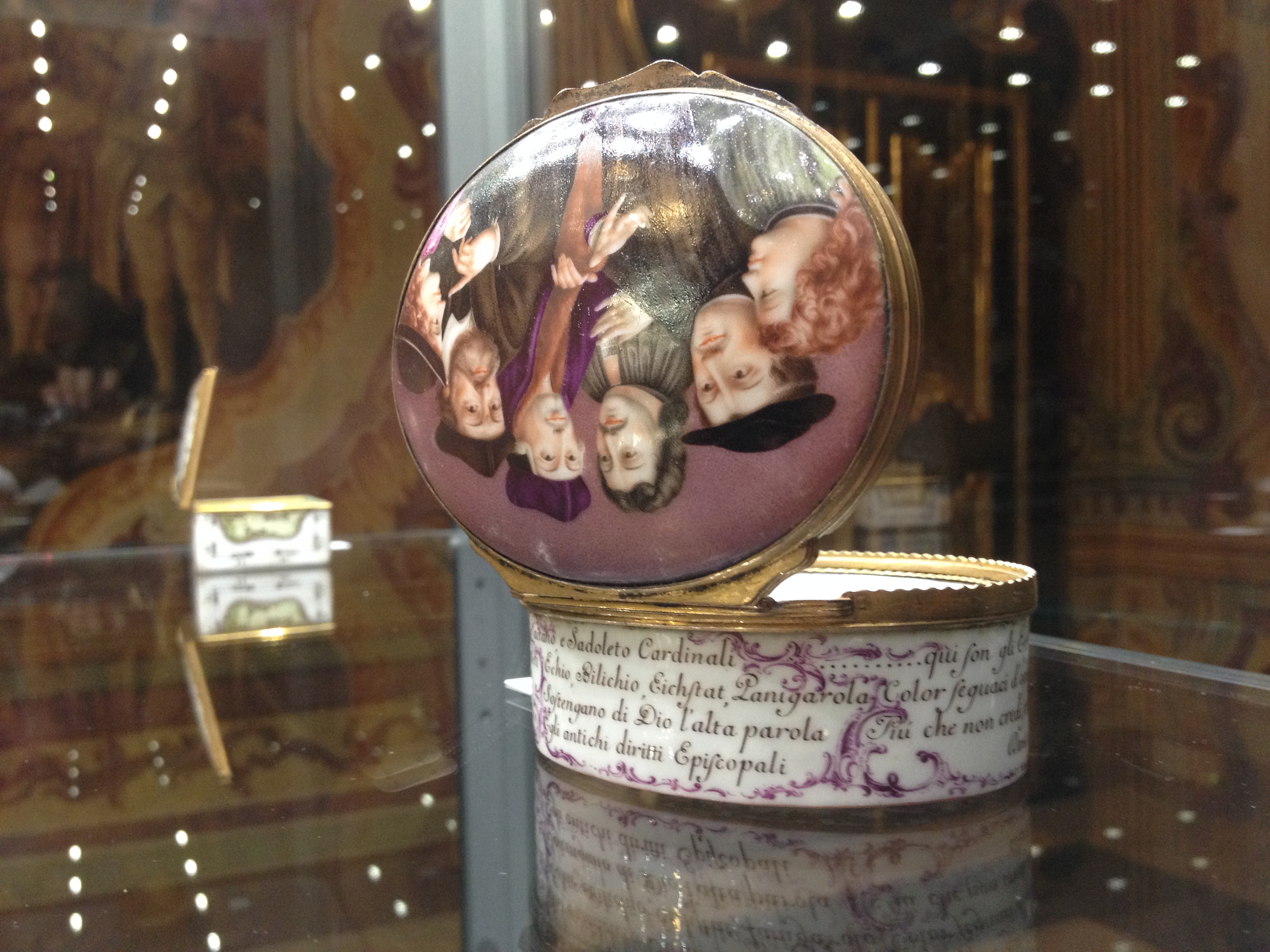 La Tabacchiera degli eresiarchi della Manifattura Doccia, anno 1760, del Museo Duca di Martina di Napoli. Esterno: i princìpi della riforma protestante: Erasmo, Calvino Lutero, il conte di Nassau, Renata duchessa di Ferrara. Porcellana/Pittura/Doratura, Rame/Cesellatura/Doratura In questa foto esposta ad agosto 2015 nell'evento "Viaggio attraverso le preziose collezioni del Duca di Martina" provenienti dal Museo "Duca di Martina" di Napoli.